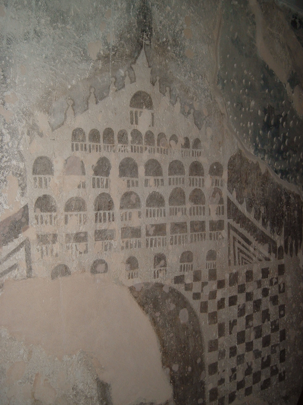 Graffiti veneciano en el Castillo de la Atalaya de Villena, provincia de Alicante.